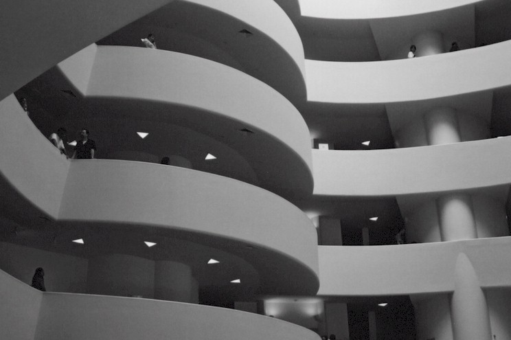 The Guggenheim in NYC